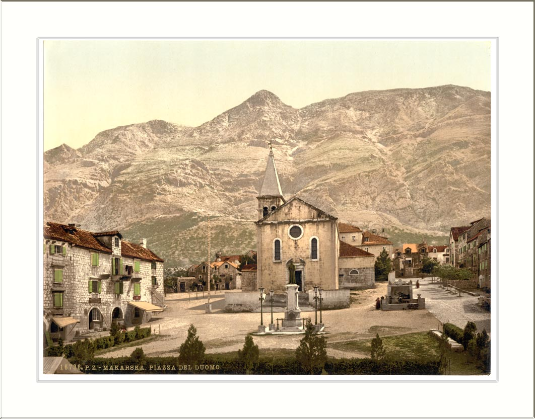 Makarska Cathedral Square Dalmatia Austro-Hungary